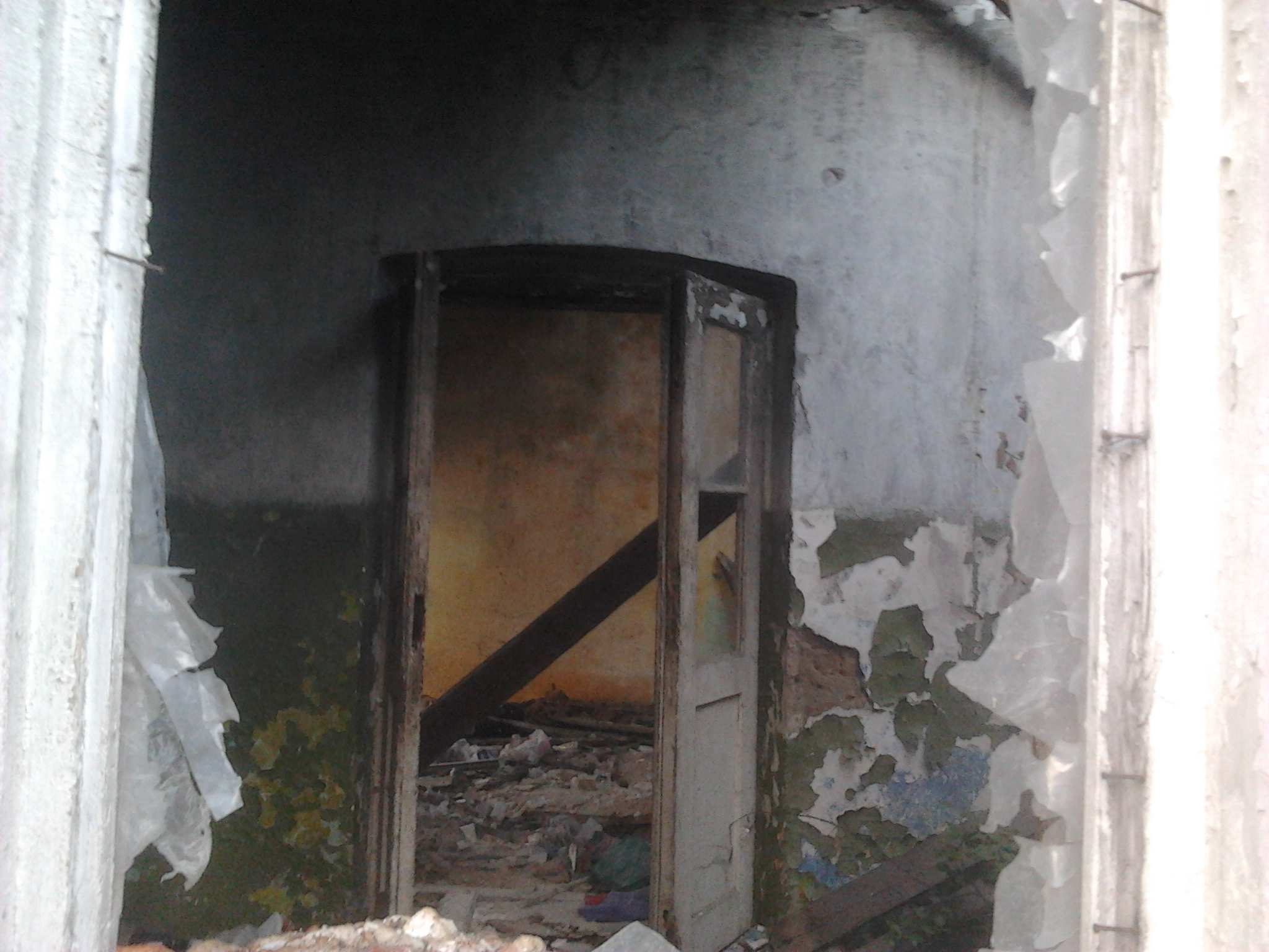 Калуська жандармерія зсередини